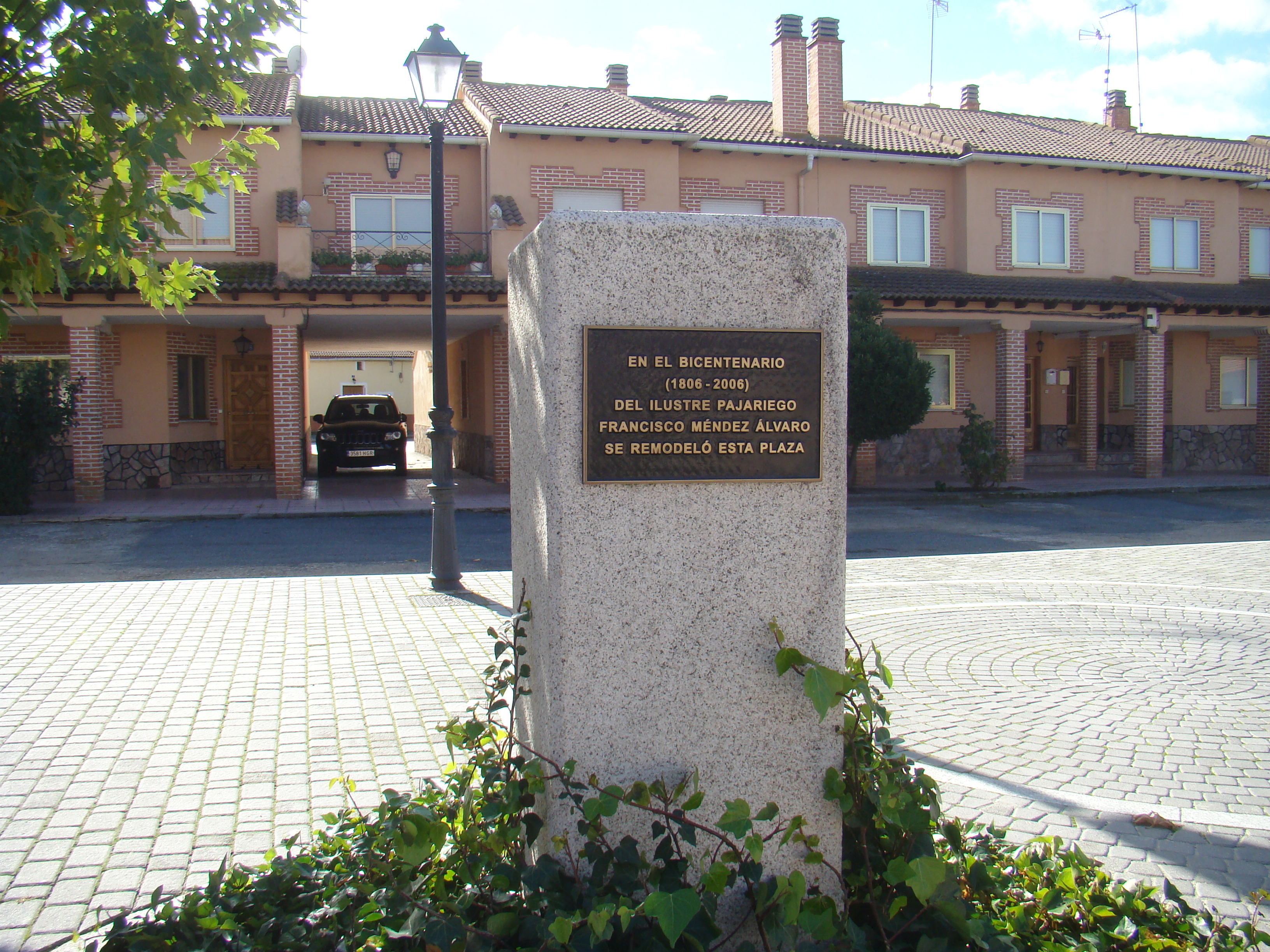 Municipio de Pajares de Adaja en Ávila, España. Homenaje a Francisco Méndez Álvaro (Pajares de Adaja 27 de julio de 1806– Madrid, 19 de diciembre de 1883), político, médico y escritor español, alcalde de Madrid durante el reinado de Isabel II.